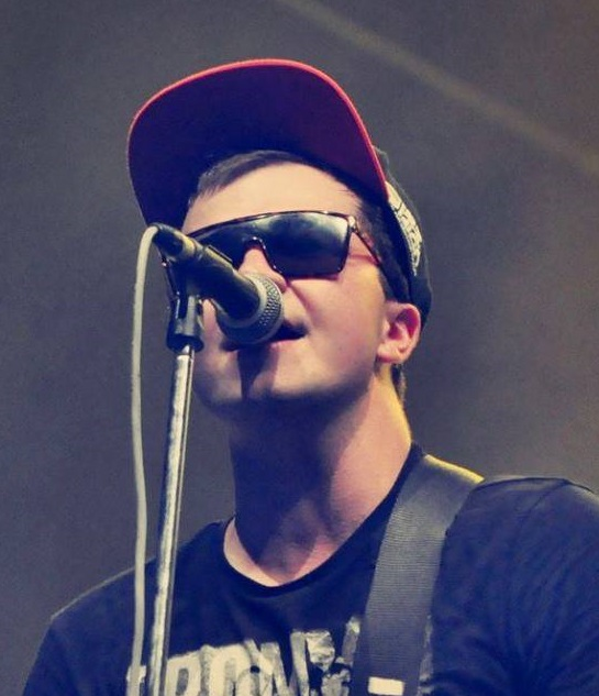 Milan Kováč